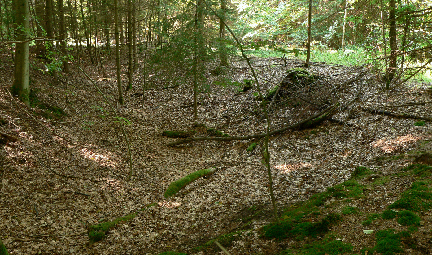 Wall-Grabenanlage Iseshusen, Nordostseite, links das Plateau, und neben dem Graben rechts der Wall